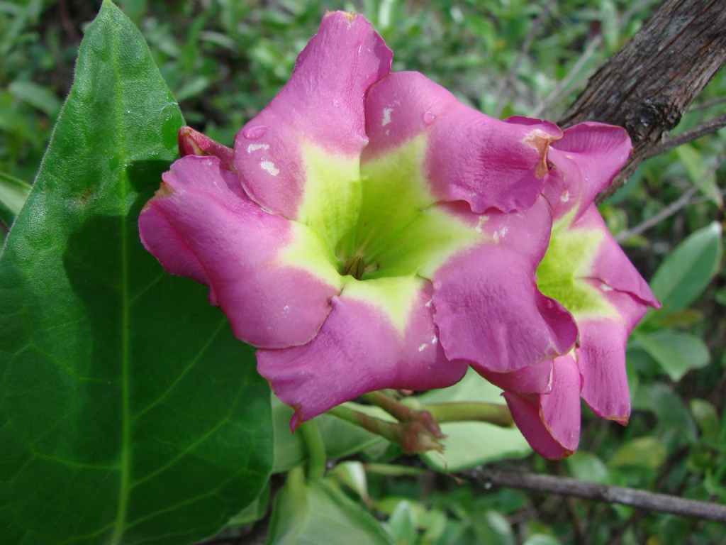 Temnadenia violacea - APOCYNACEAE Parque Estadual da Serra dos Pirineus - Pirenópolis - Goiás - Brasil.